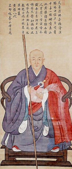 悦峰道章の頂相。